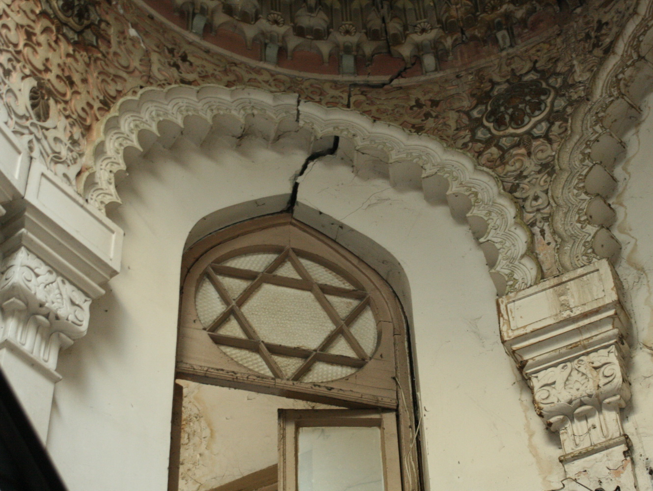 Еврейский дом. Дом на самом деле был армянский, но он весь украшен такой вот символикой